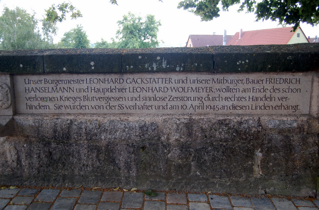 Inschrift zum Gedenken an die 1945 erhängten Männer von Brettheim Friedhofseingang in Brettheim, Gemeinde Rot am See, Landkreis Schwäbisch Hall, Baden-Württemberg.